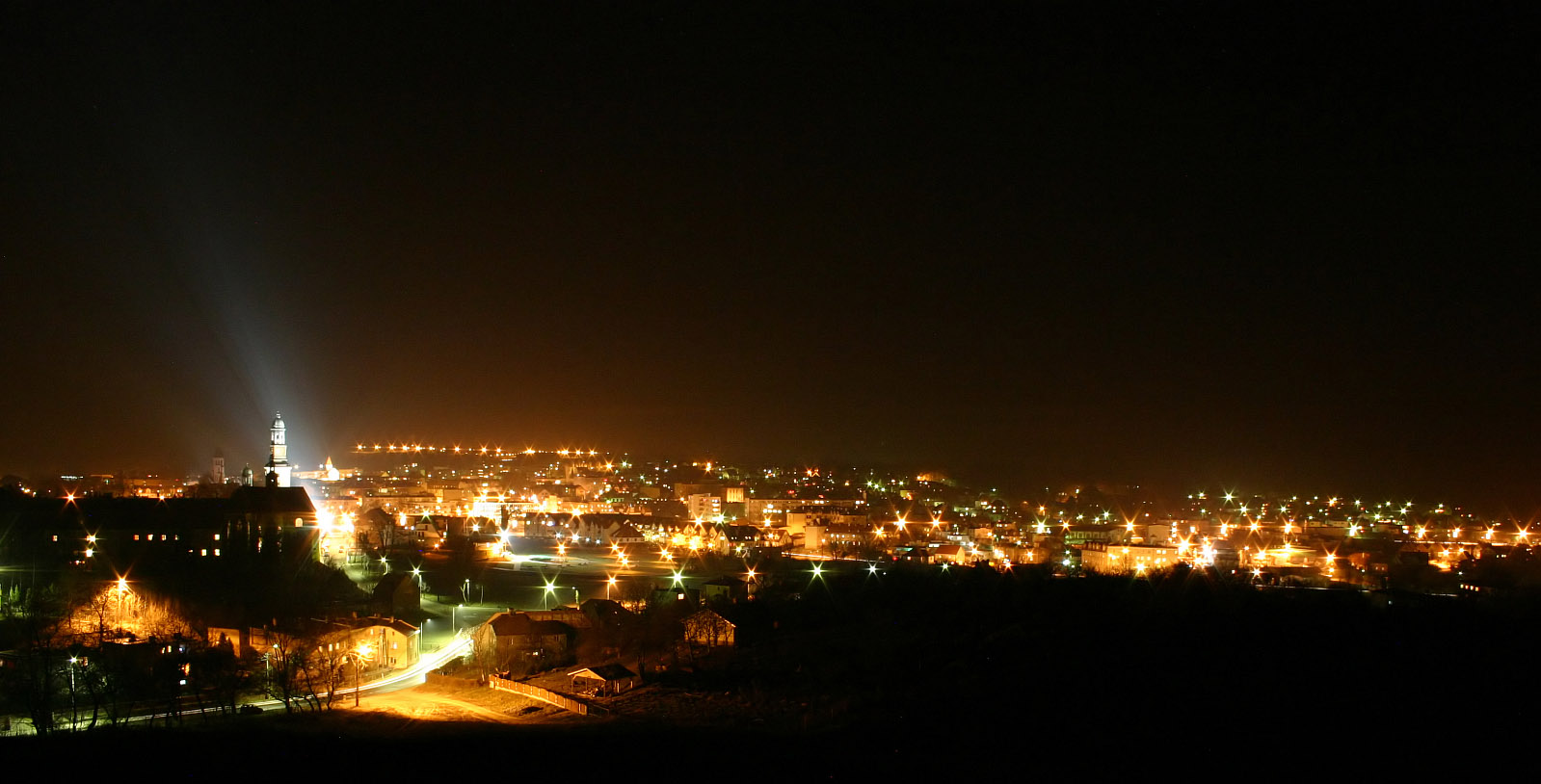 Panorama Trzebnicy, widok na środkową część miasta.